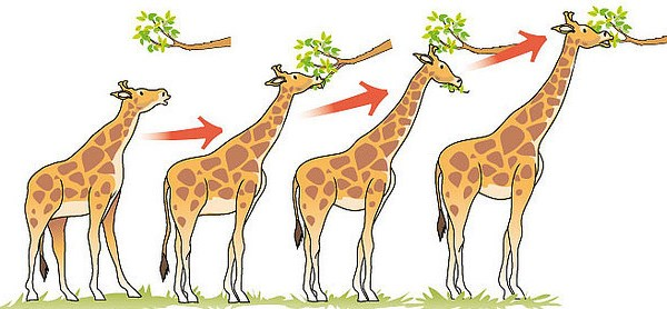 imagen